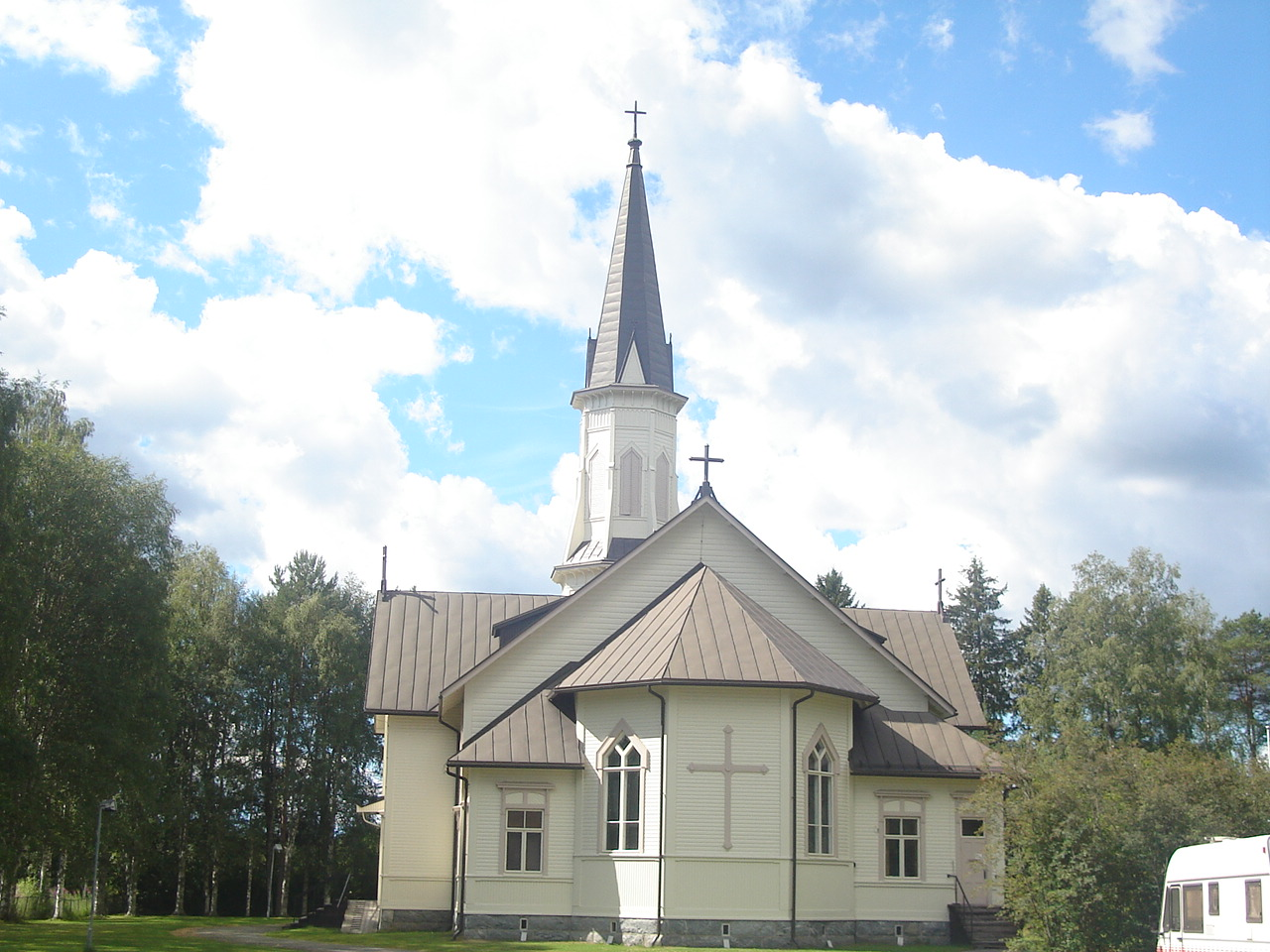 Viekin kirkko